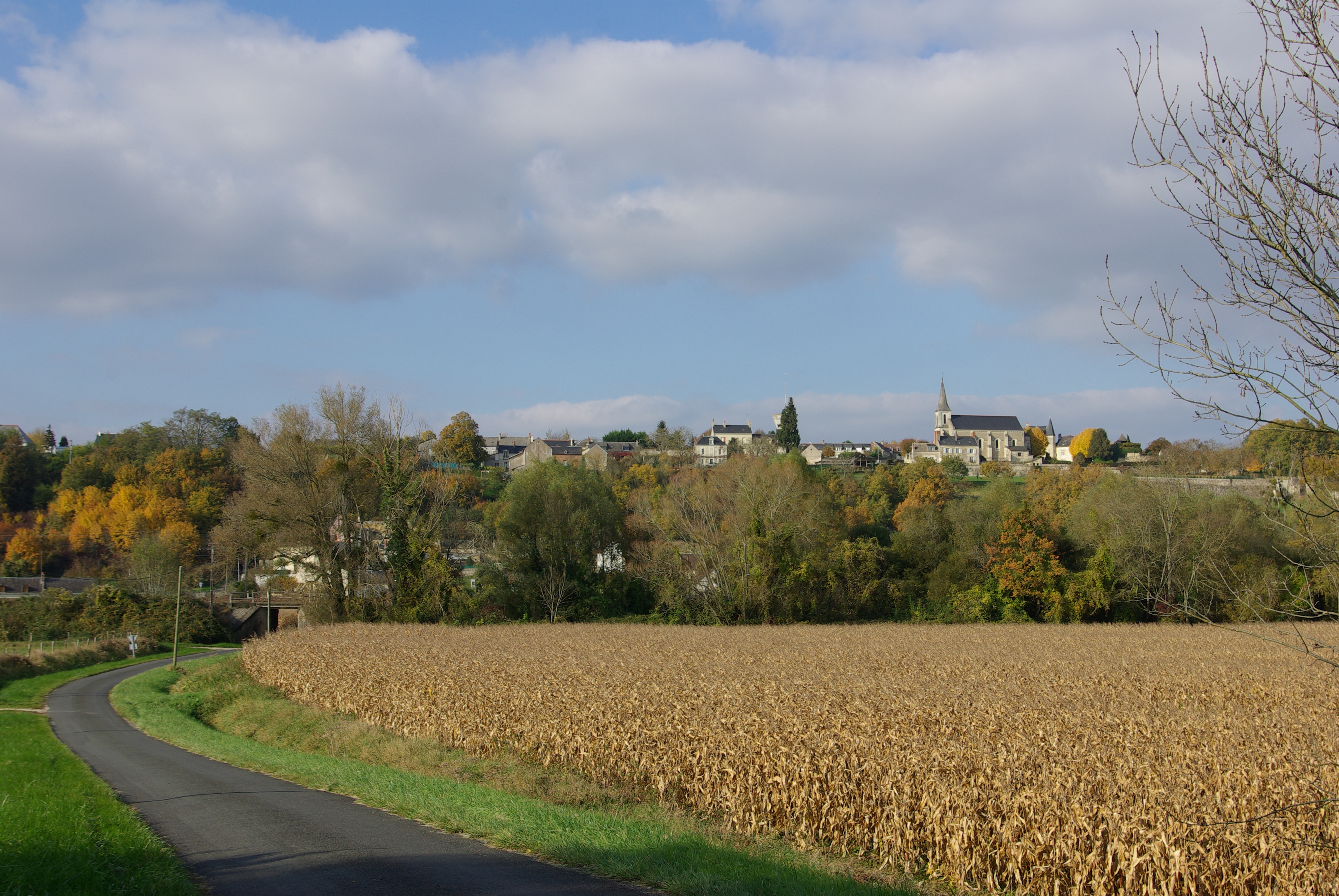 View of Saint-Michel-sur-Loire (France) Vue de Saint-Michel-sur-Loire (France)